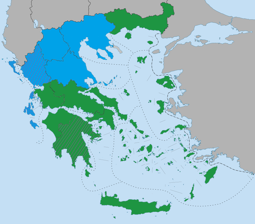 Αποτελέσματα με βάση το Υπουργείο Εσωτερικών ΠΑ.ΣΟ.Κ. Ν.Δ. ΛΑ.Ο.Σ.